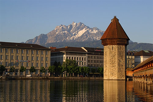 Wasserturm in Luzern mit Pilatus (Nr. 03.1-4646)